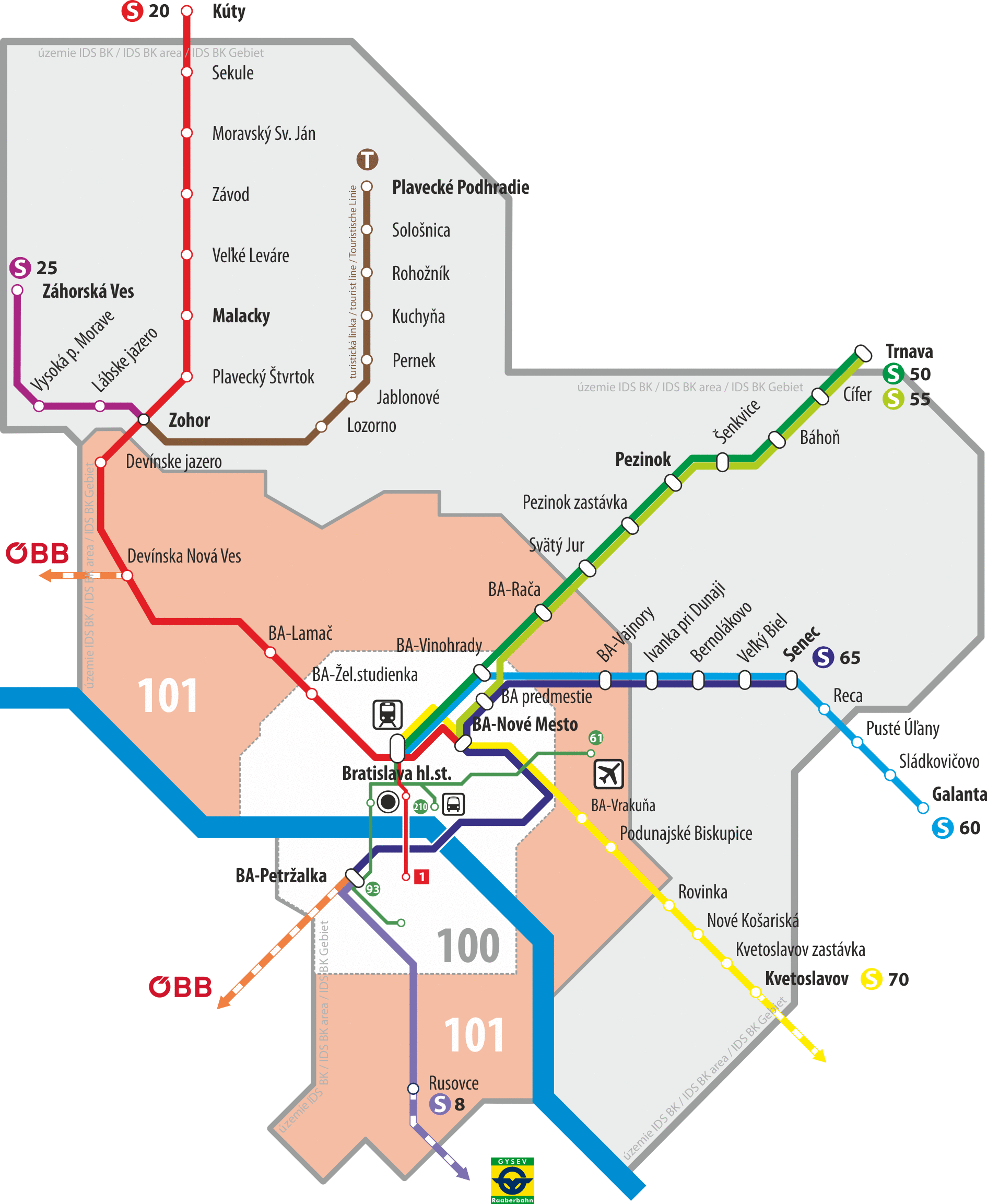 Mapa mestských železničných tratí a liniek v Bratislave v roku 2018